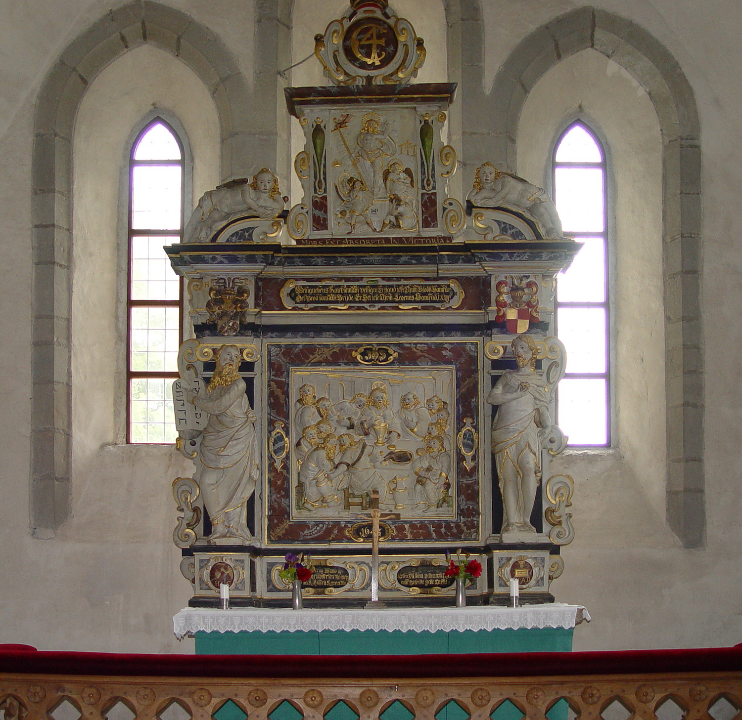 Hablingbo kyrka auf Gotland: Altaraufsatz aus behauenem Sandstein aus Burgsvik, 1643 gefertigt von Peter van Egen. Darstellung: Stiftung des Abendmahls zusammen mit der Auferstehung. Die Figuren an der Seite stellen Moses mit den Gesetzestafeln dar und Johannes den Täufer.